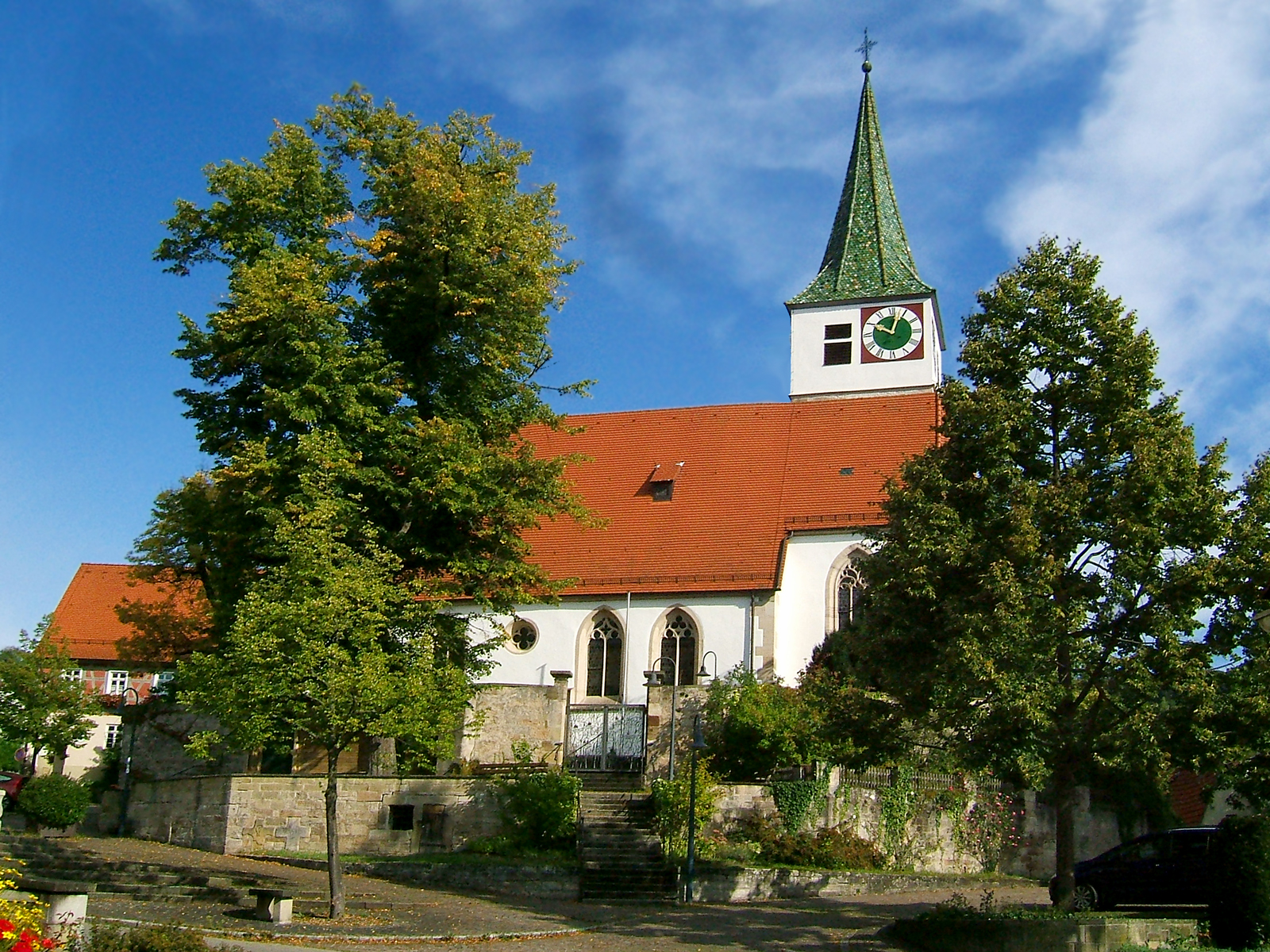 Dionysiuskirche in Remshalden-Grunbach, Deutschland